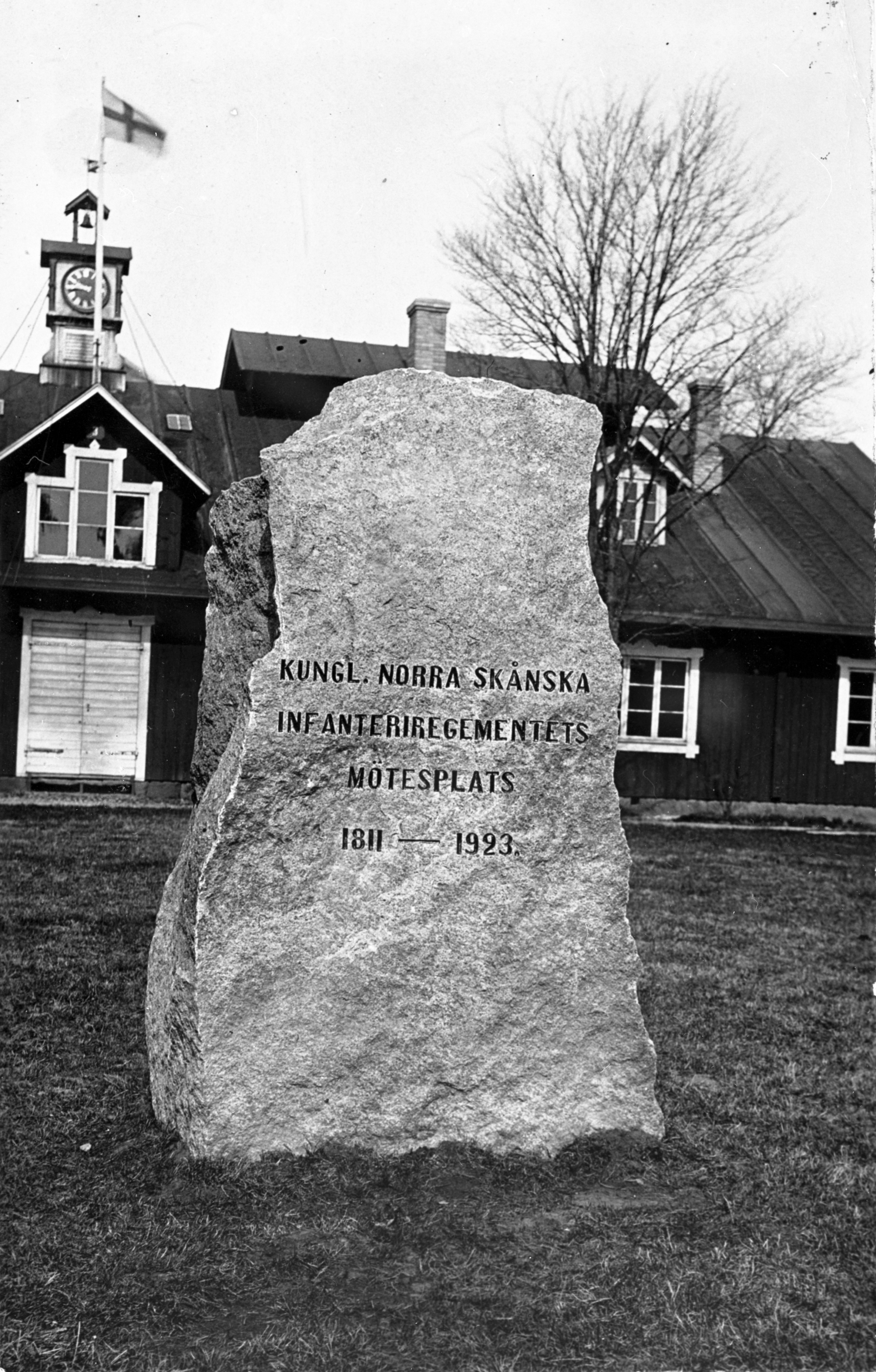 Minnessten över Kungliga Norra skånska infanteriregementets.1811-1923